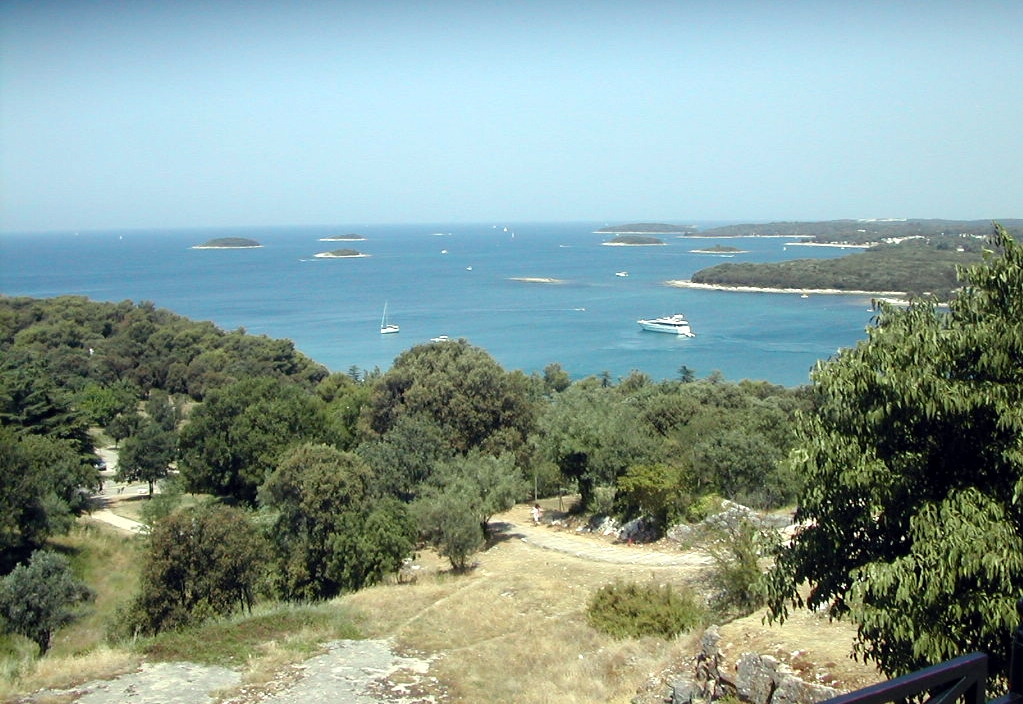 Ezer apró sziget Vrsar mellett